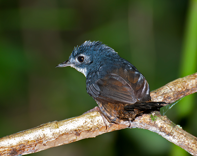 Registro-SP - Brasil